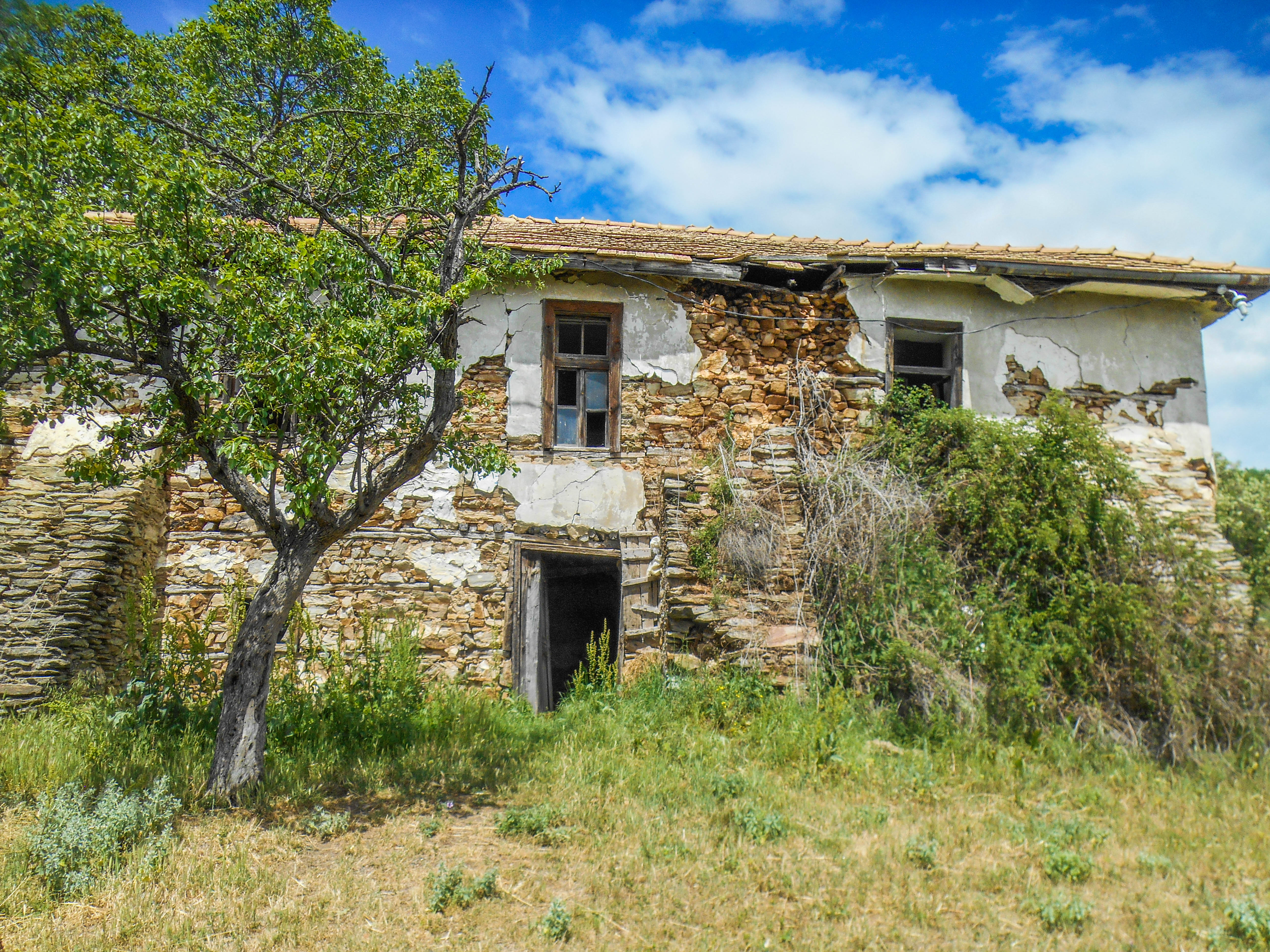 Поранешна полициска станица и училиште - Требичино